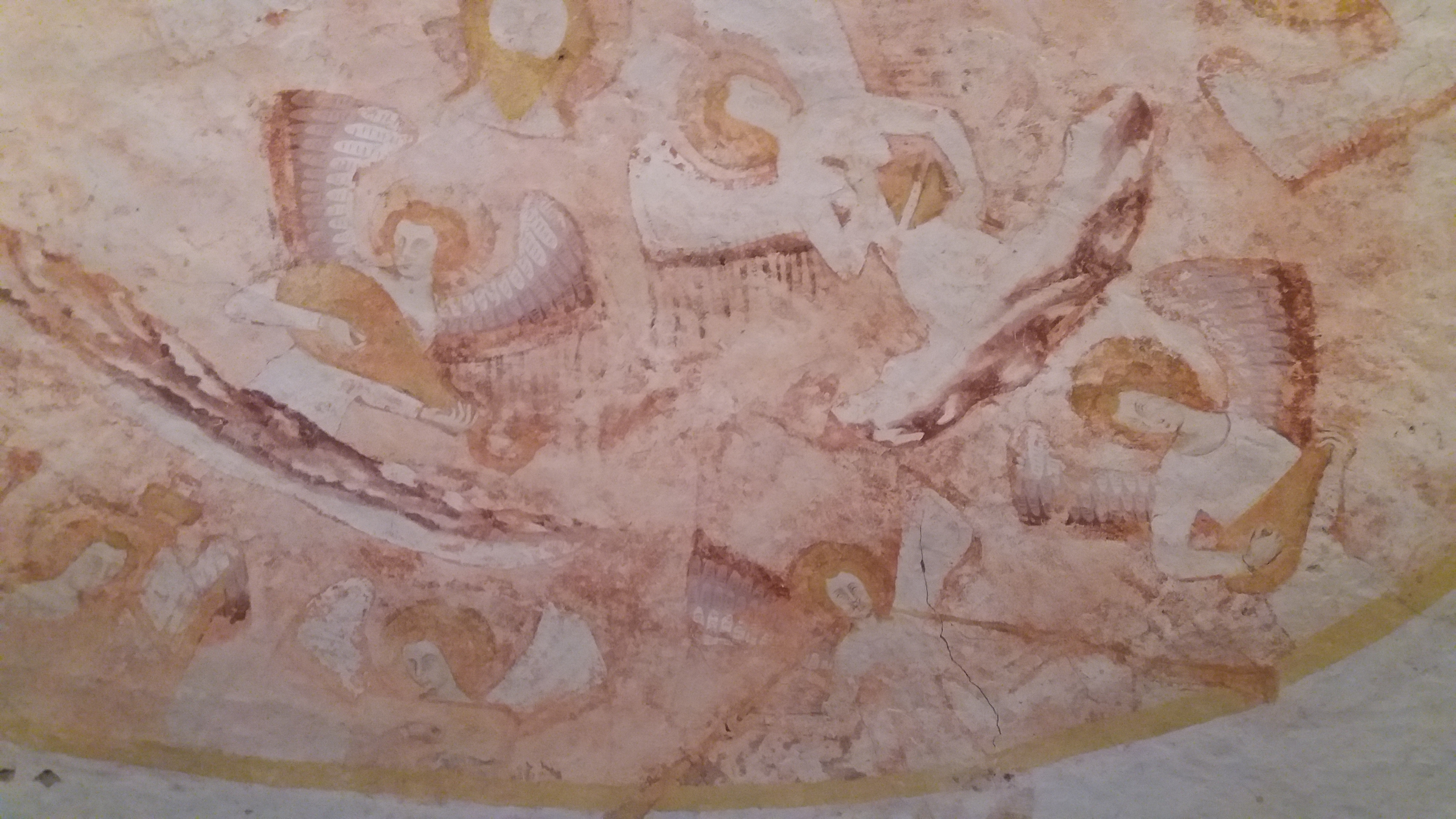 Fresque d'anges musiciens de la chapelle.